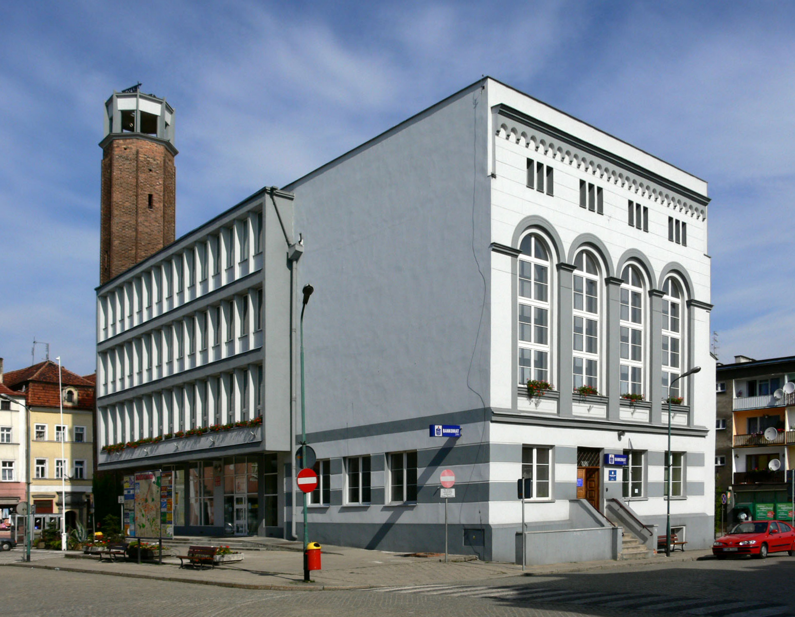 Kożuchów - Ratusz.